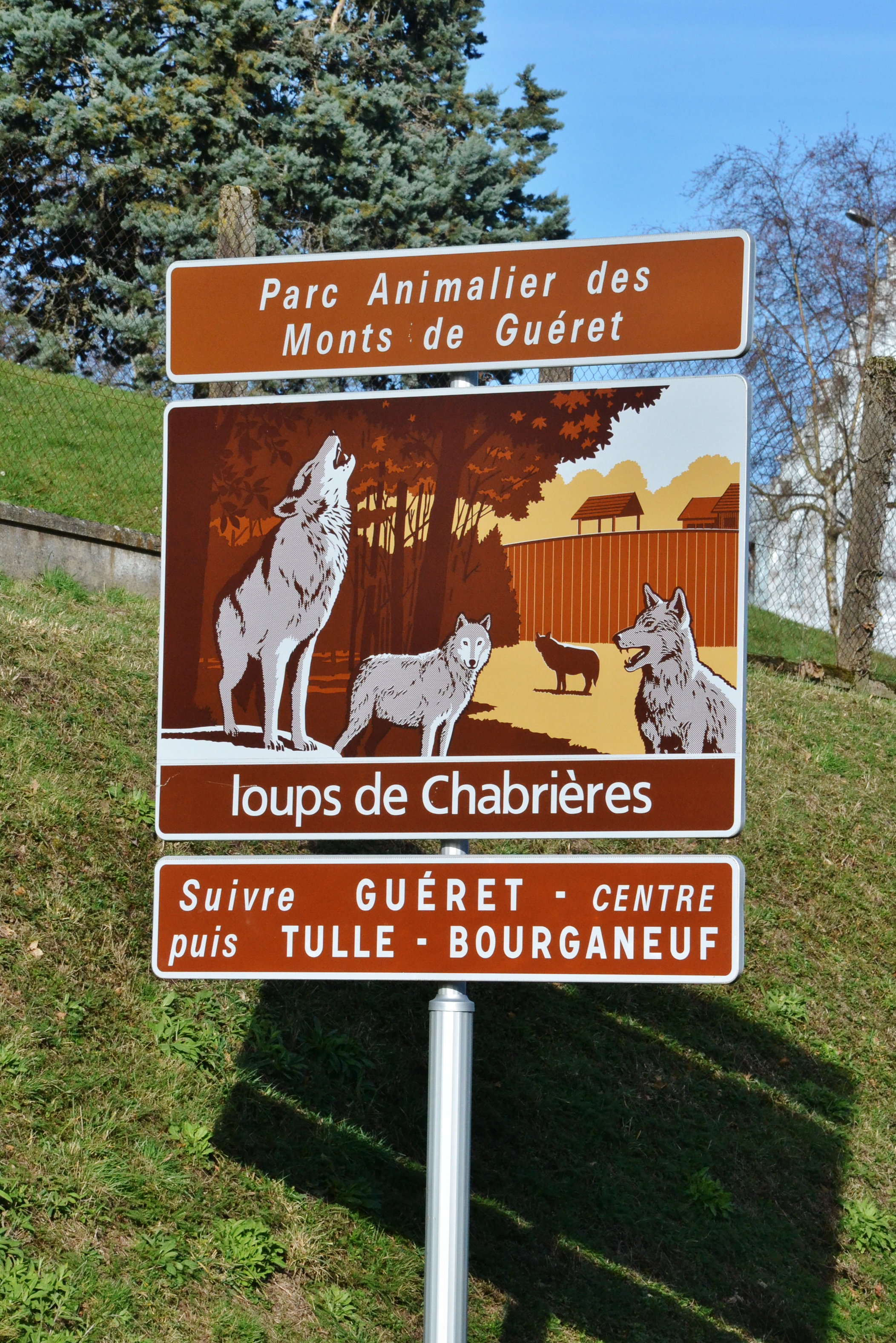 Panneau touristique indiquant à l'entrée de Guéret le parc animalier des loups de Chabrières (Creuse, France)